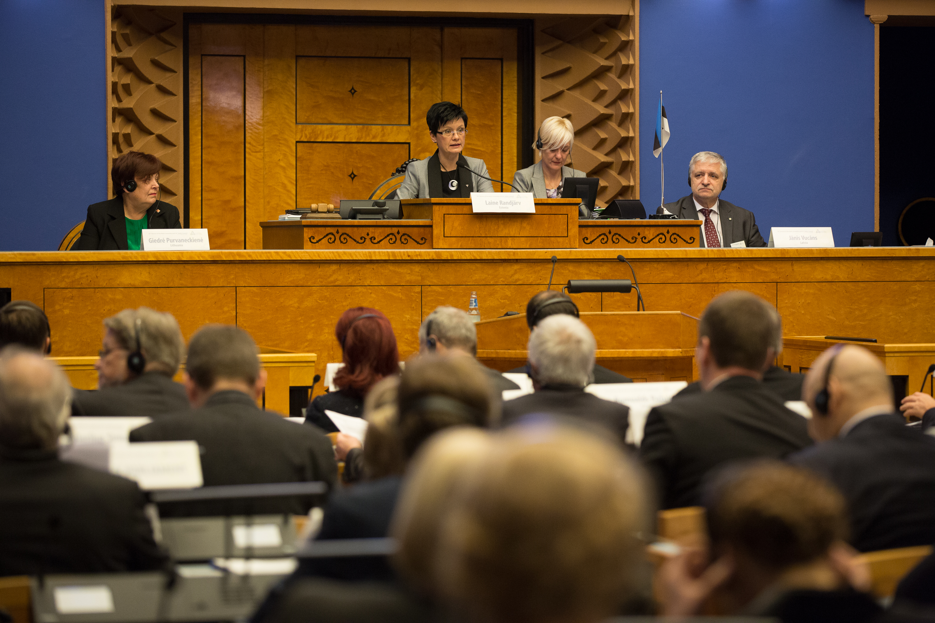 2014.gada 24.oktobris. Baltijas Asamblejas 33. sesija. Foto: Ernests Dinka, Saeimas Kanceleja Izmantošanas noteikumi: saeima.lv/lv/autortiesibas